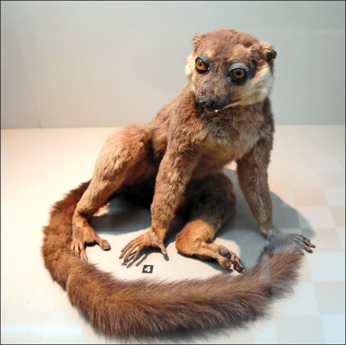 Le muséum de Saint-Denis de la Réunion possède une collection importante de lémuriens naturalisés provenant de Madagascar. La vitrine présente un "Eulemur fulvus collaris" Les populations de lémuriens sont très menacées par la déforestation de Madagascar. A Saint-Denis, le jardin d'acclimatation créé par la Compagnie des Indes abrite le bâtiment néo-classique du Palais législatif qui est devenu en 1855 le muséum d'histoire naturelle. Les collections sont constituées en grande partie entre 1865 et 1893 grâce à des dons, des collectes dans les îles de la zone, et également des échanges avec d'autres musées (Paris, Strasbourg, Leyde aux Pays-Bas, Port-Adélaide en Australie).